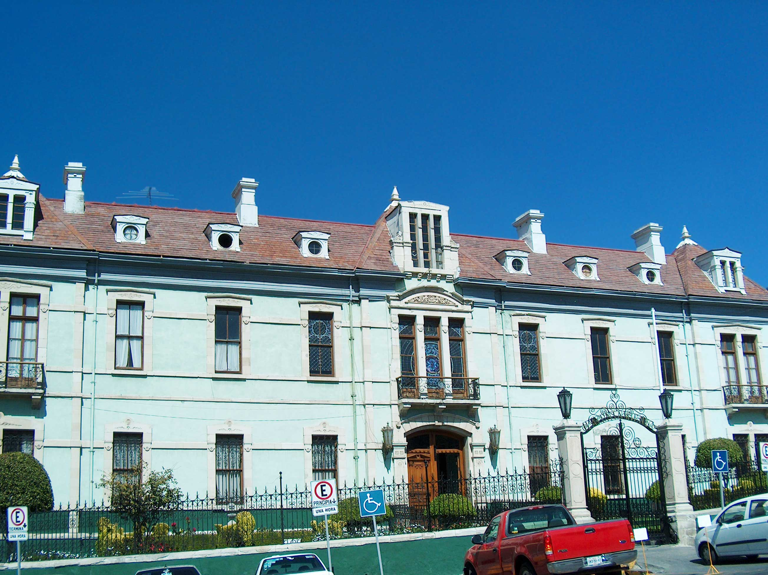 conde ruli